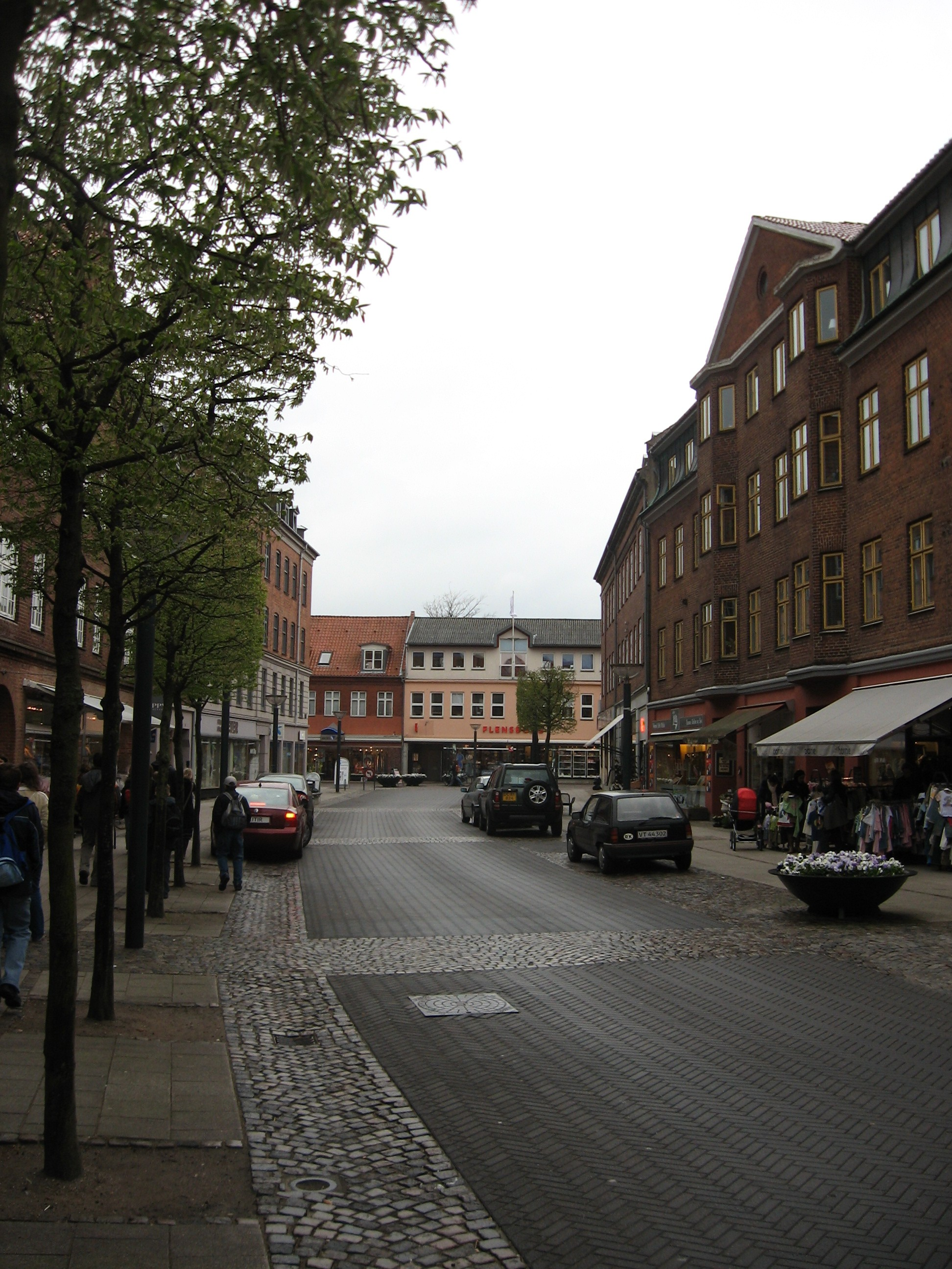 Ringstedi utcakép, Dánia